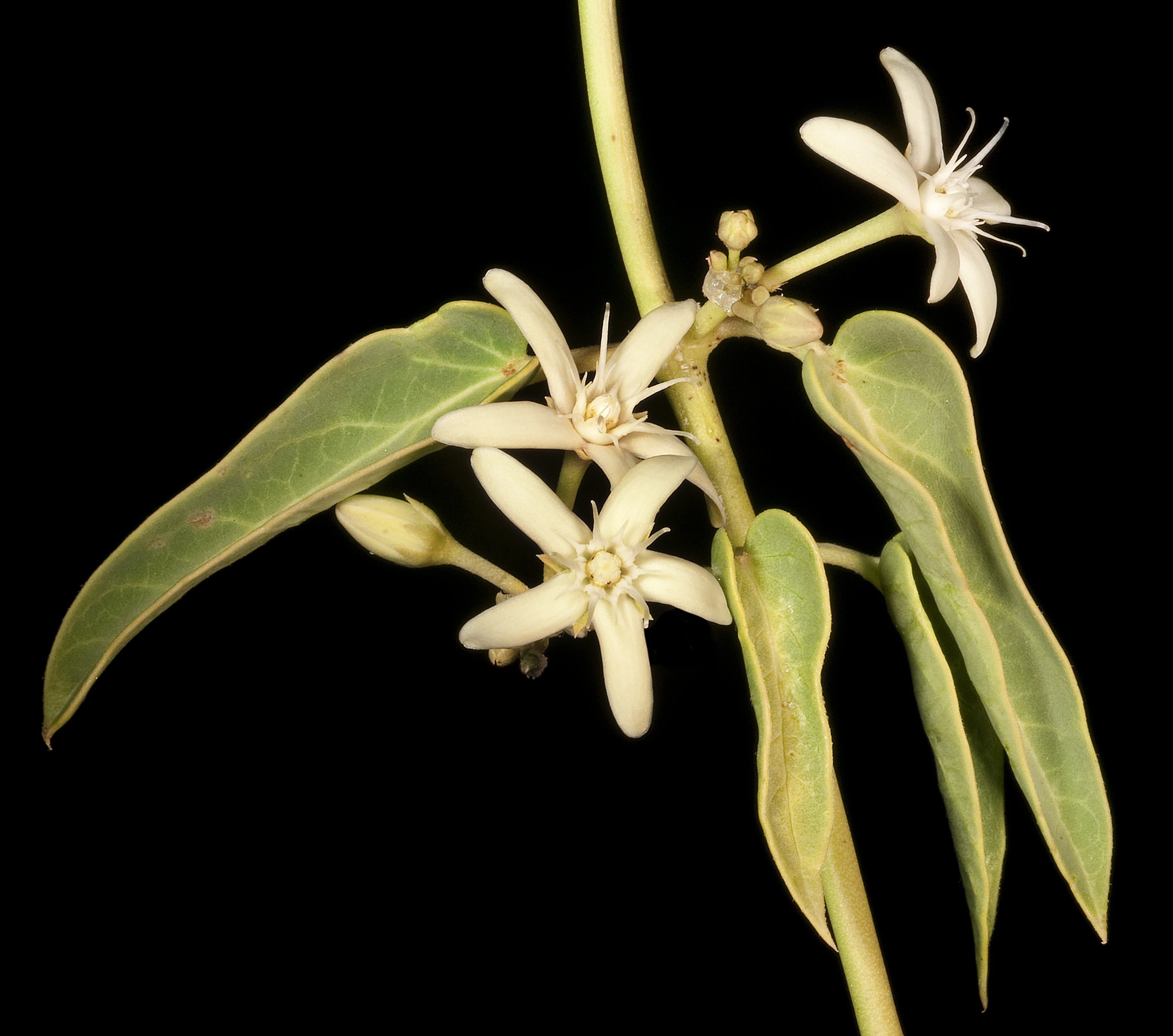 KRT4574